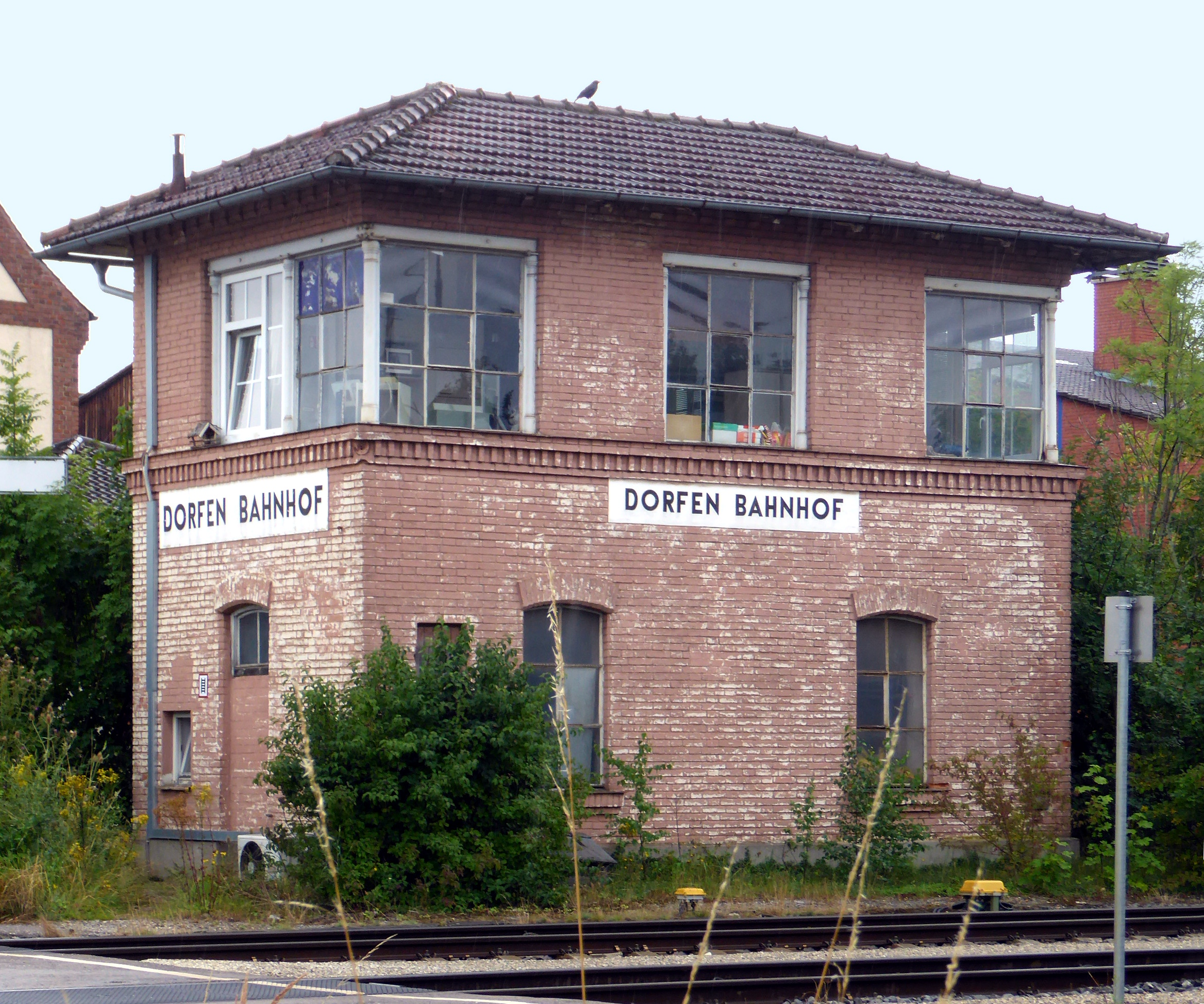 Dorfen, östliches Stellwerk des Bahnhofs, bei der früheren Ziegelei. Von hier war die Weiche zur früheren Lokalbahn nach Velden einsehbar.